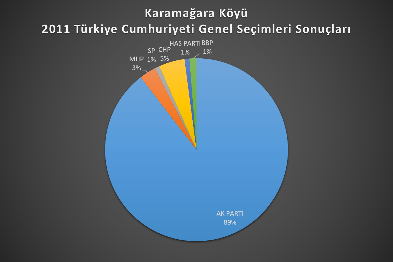 Karamağara Köyü 2011 Sonuçları Buradan bakılarak hazırlandı